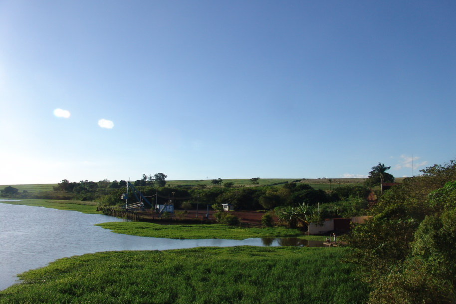 Imagem do rio Jaú, na divisa dos municípios de Bariri e Itapuí, estado de São Paulo, Brasil.